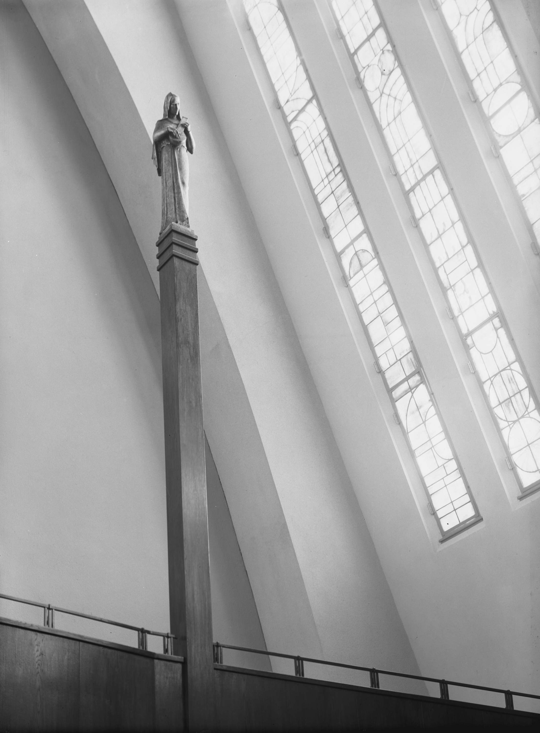 Krematorium Ohlsdorf (Hamburg-Ohlsdorf): Inneres der Kapelle SchumacherWV Nr. 280